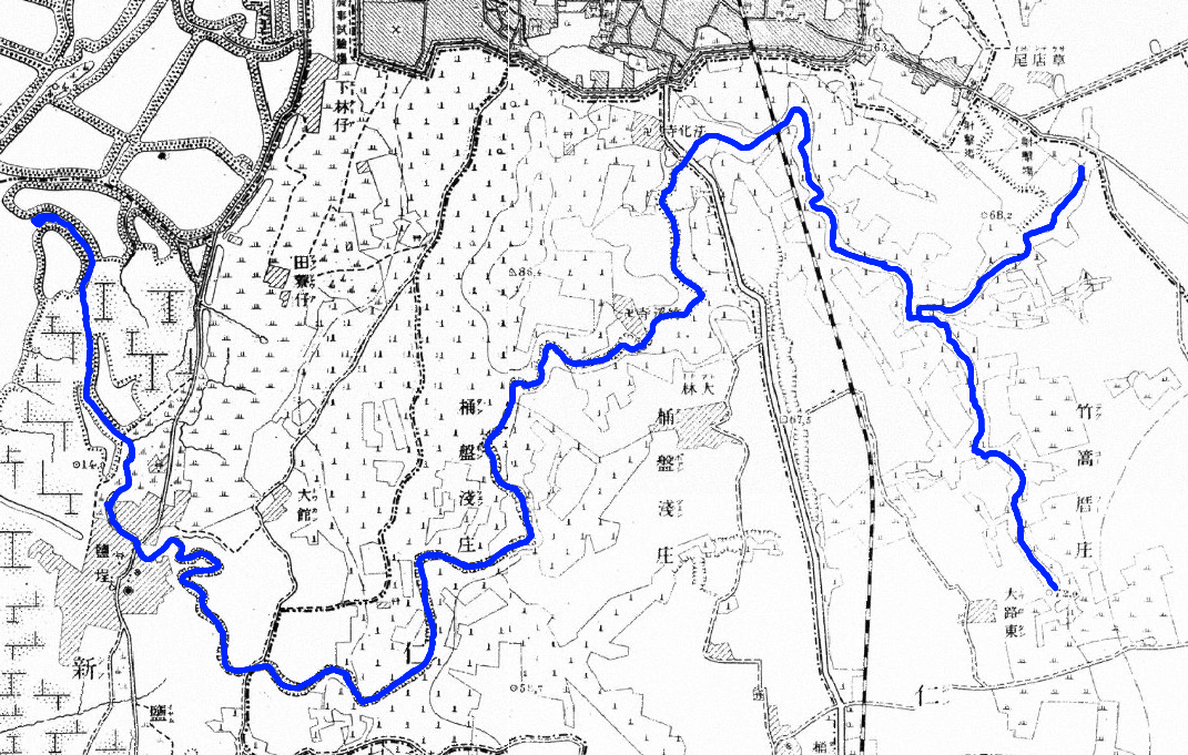 臺灣堡圖（1904年）上的竹溪流域